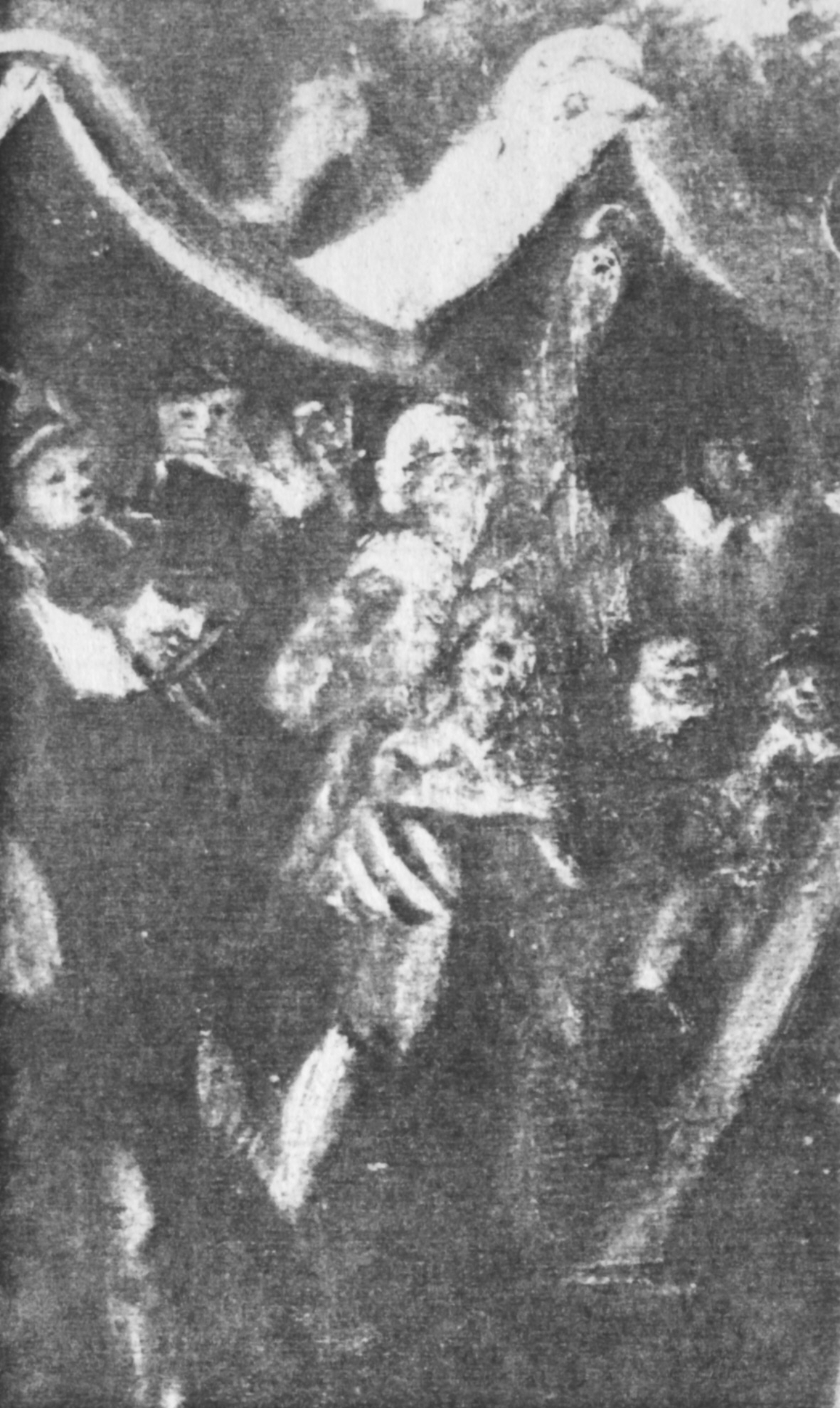 Der Narr des Bürgerschützenhofes in Lübeck, dargestellt auf einer bemalten Holztafel (heute im St.-Annen-Museum, Lübeck)